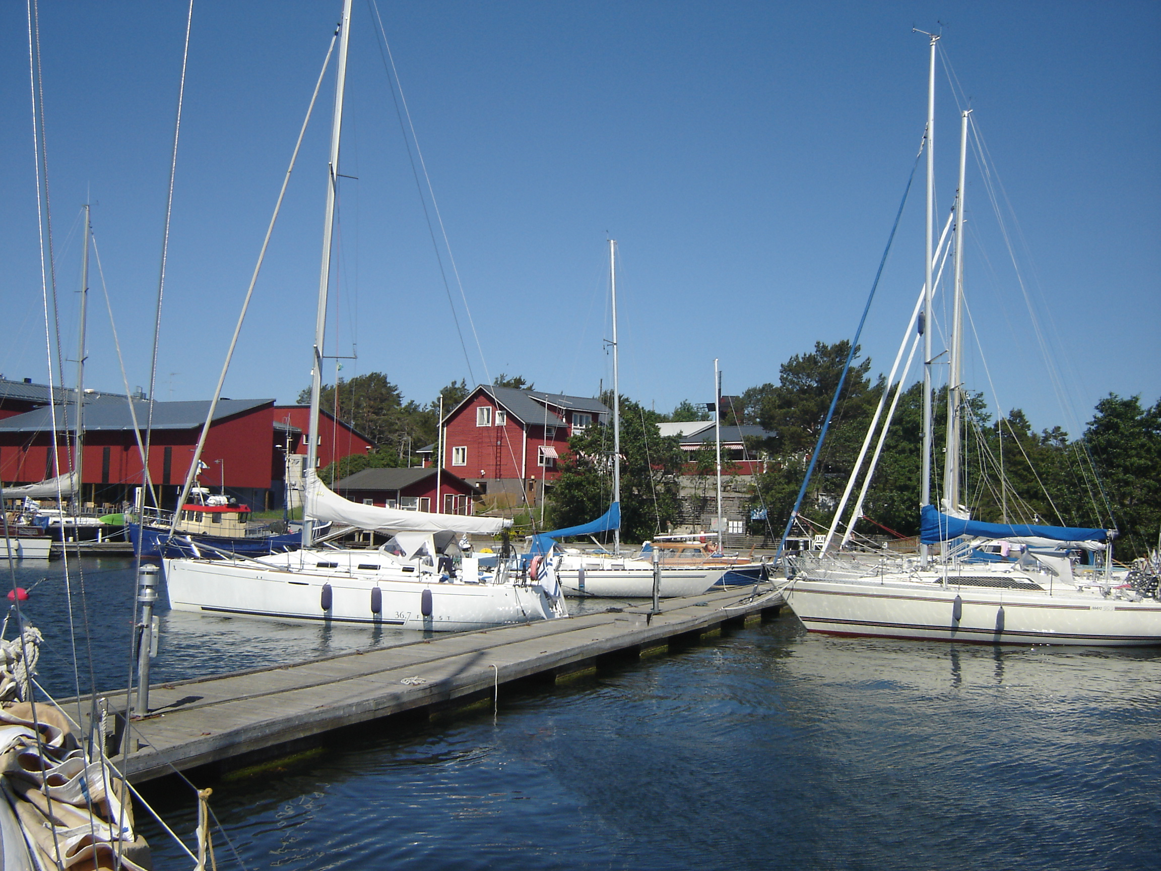 Korpoström